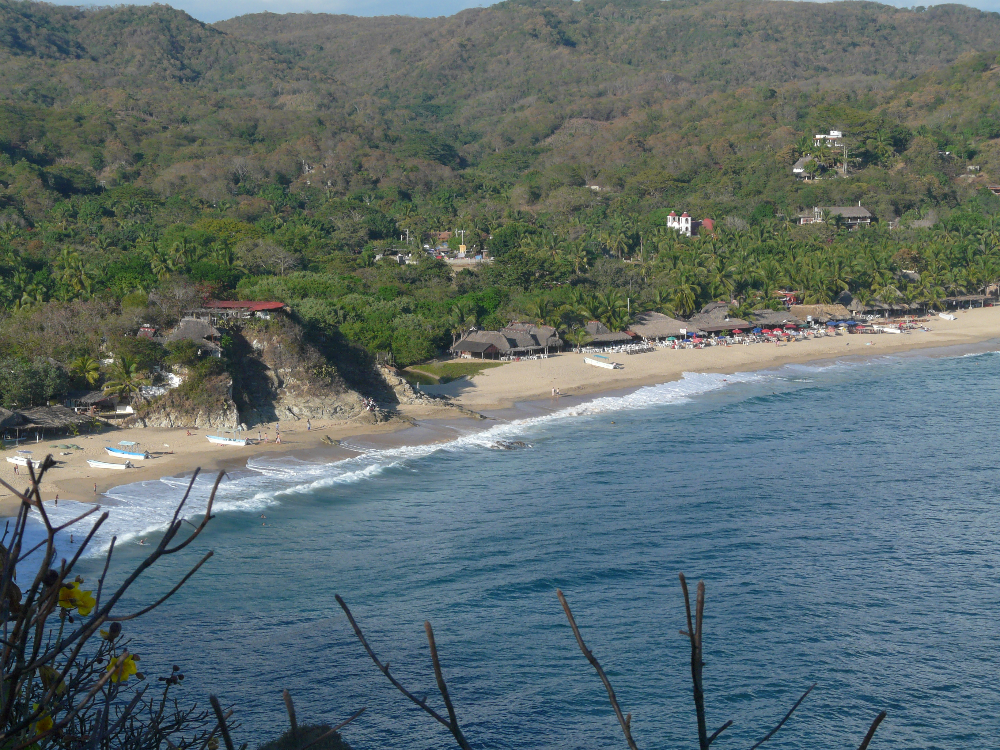 View of Mazunte, Oaxaca, Mexico